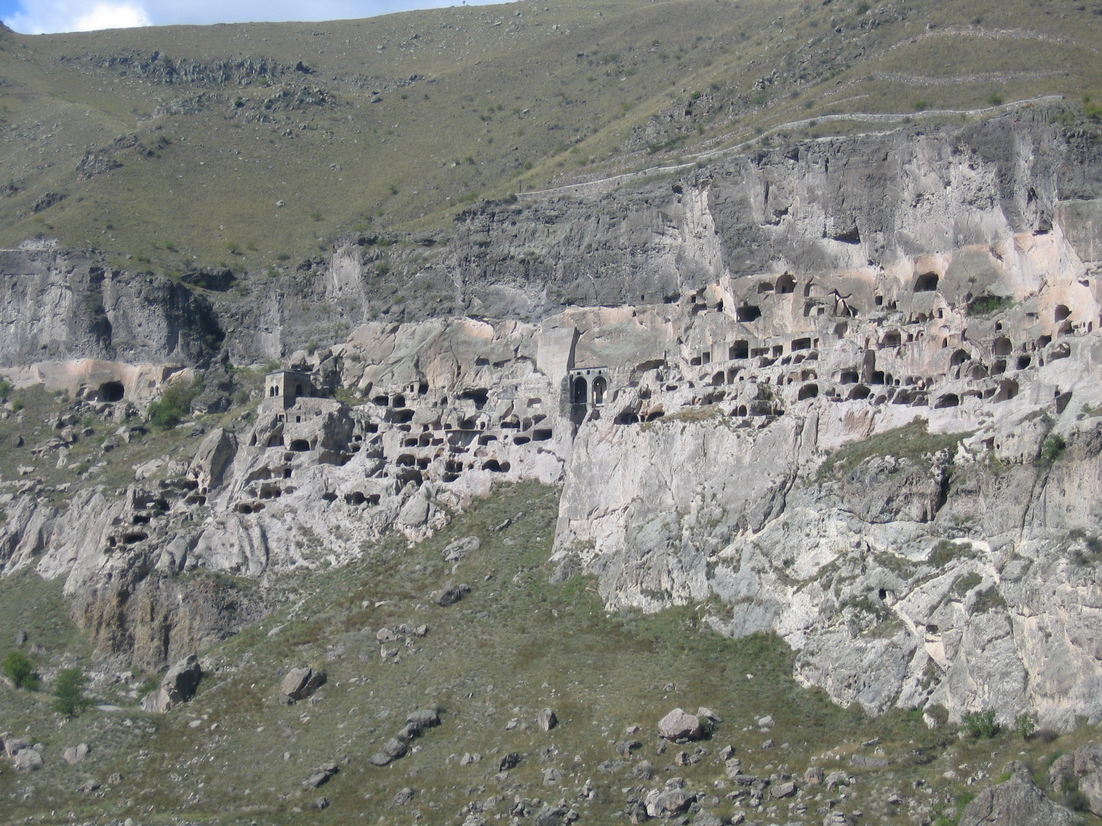 Vardzia cave complex, Georgia